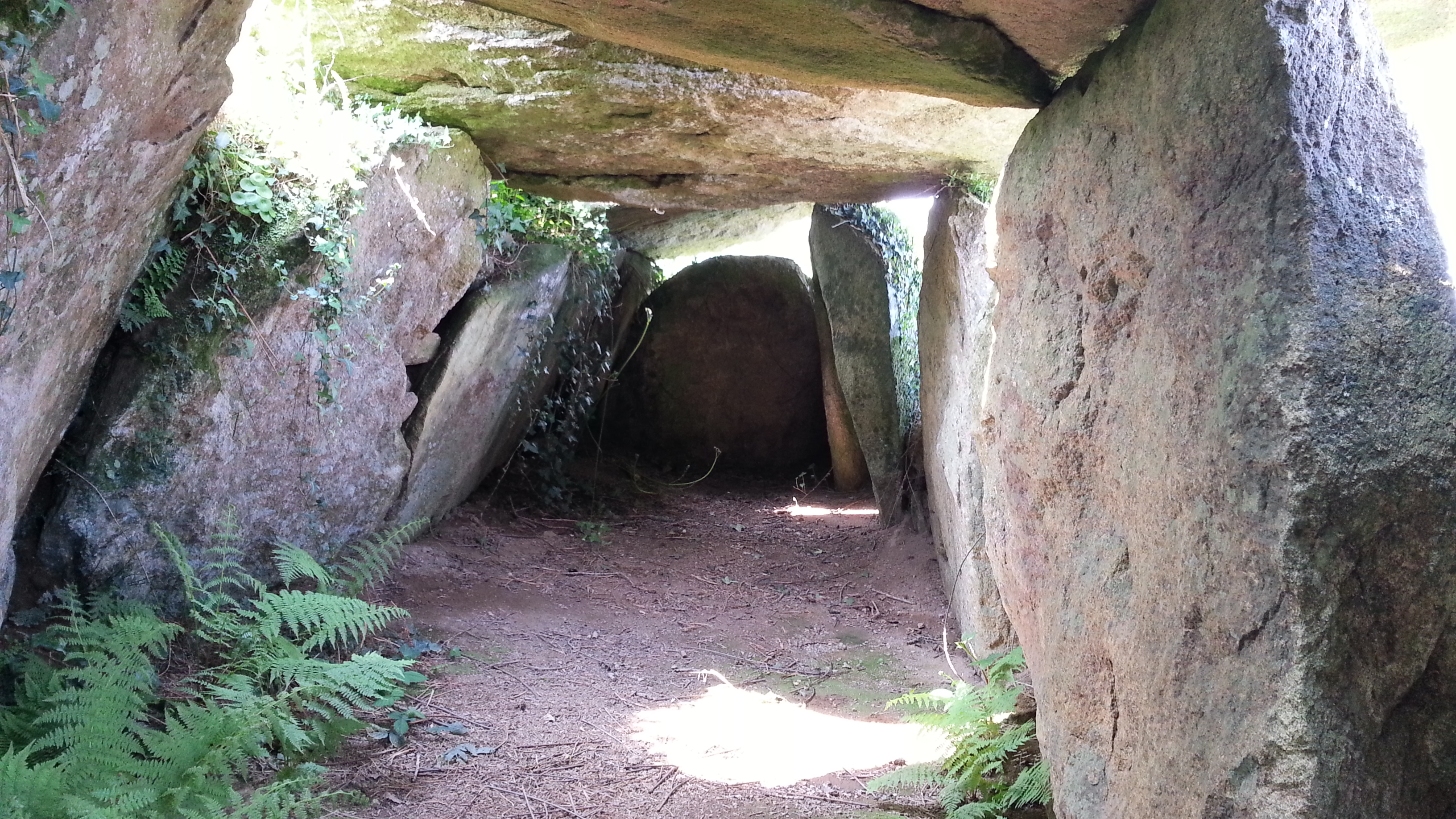 Allée couverte de Kerbannalec